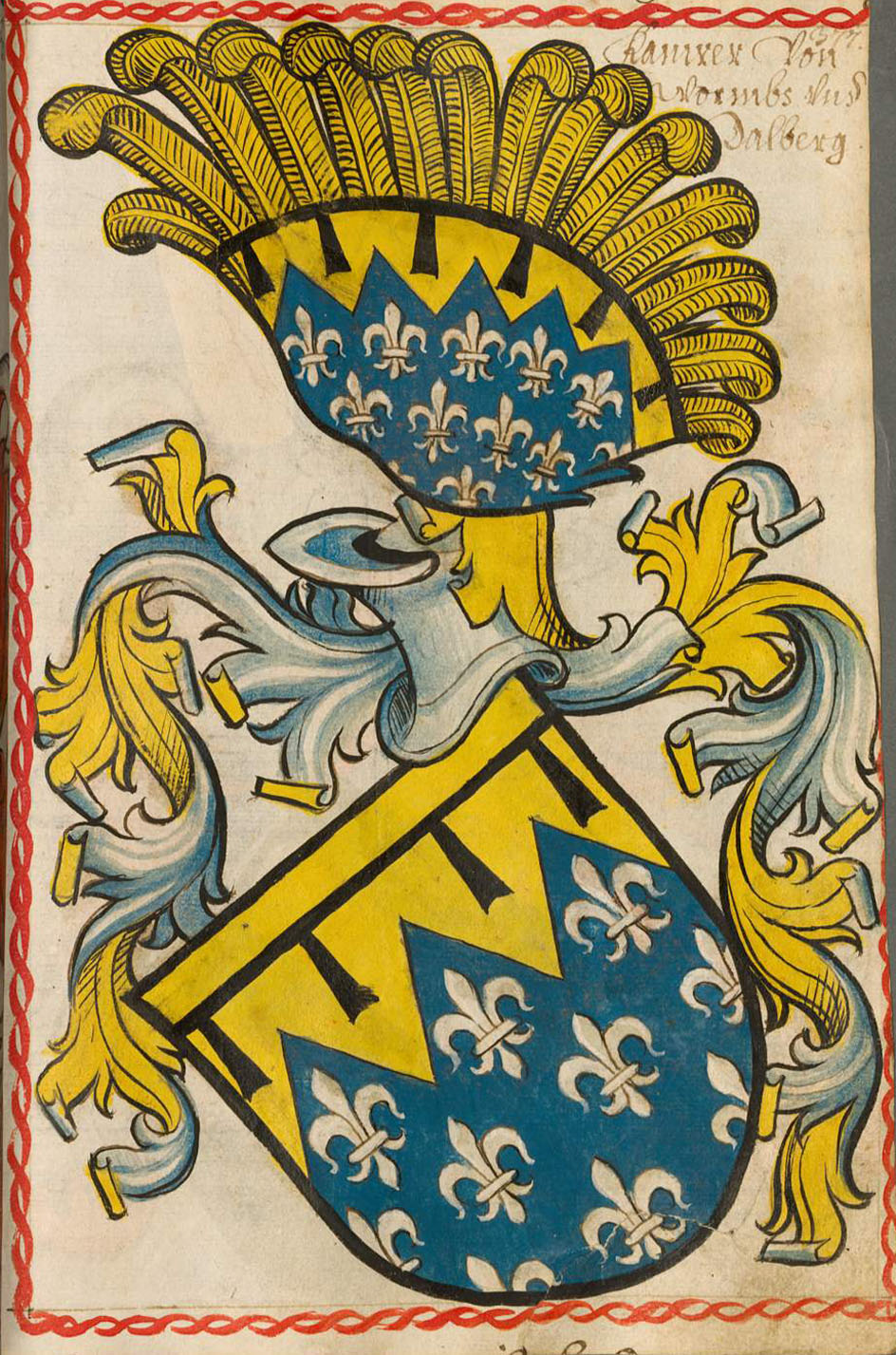 Scheibler'sches Wappenbuch , älterer Teil Dalberg Kämmerer von Worms